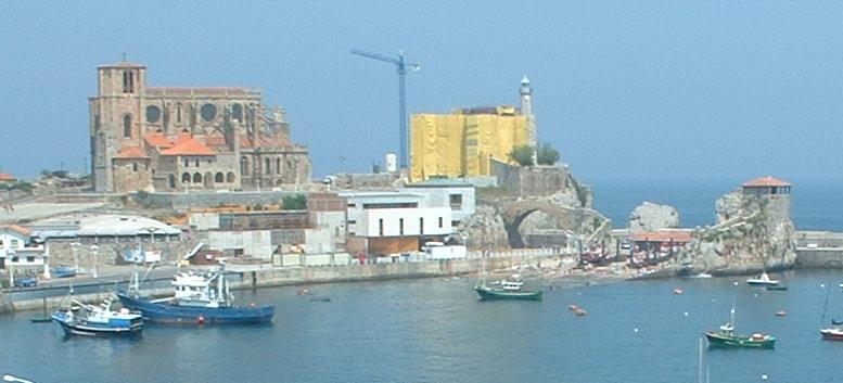 Foto de Castro Urdiales La foto la he hecho yo y autorizo su uso libremente. De hecho, solo es una parte de una foto más amplia. Está hecha desde el cuarto piso de la casa situada en Jardines 1 el verano de 2004 con una cámara Fujifilm Finepix. Si falta algún dato más, por favor, pedidlo en vez de borrar sin preguntar....--- Autor: aepef Licencia: Dominio público (PD)